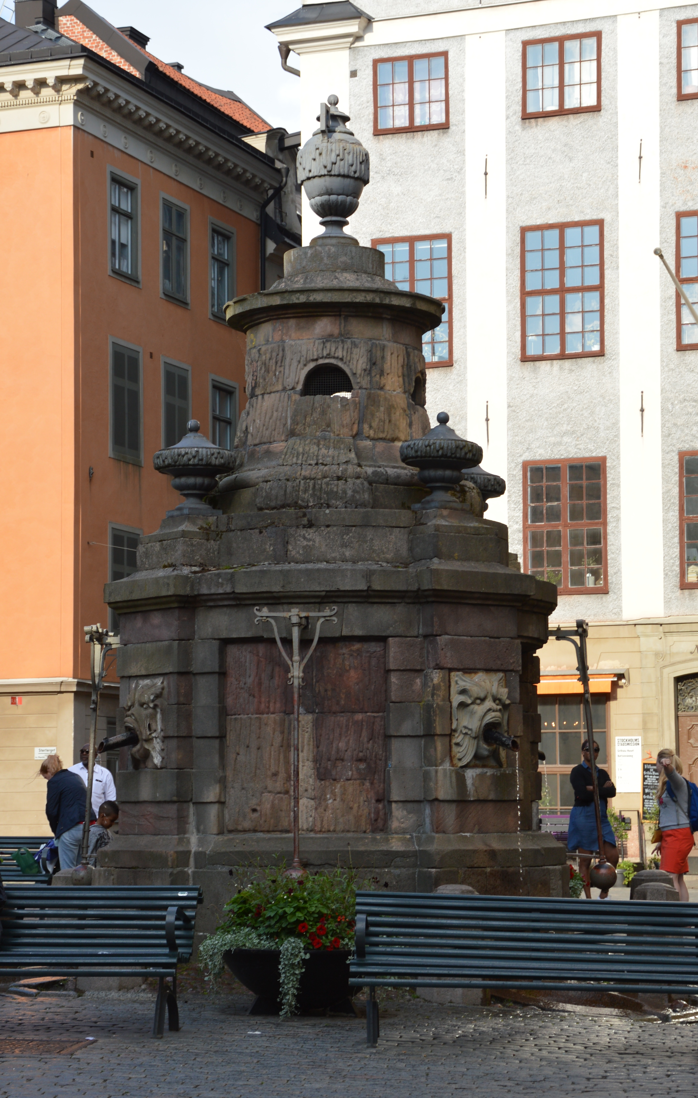 Brunnen auf dem Stortorget in Gamla Stan in Stockholm